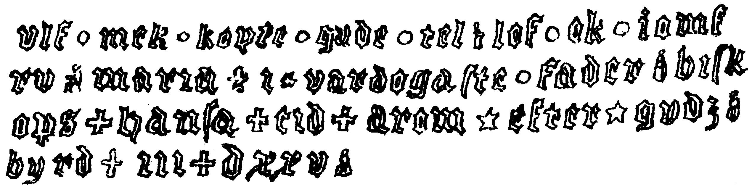 Inskrift på storklockan i Fivelstads kyrka, Östergötland. Teckning i "Utdrag af Antiqvitets-Intendenten P. A. Säves afgifna berättelse för år 1861", publicerad i Antiqvarisk tidskrift för Sverige band 1, 1864. Text: Vlf. mek. kopte. gude. tel. lof. ok. iomfrv. maria. i. vardogaste. fader. biskops. + hansa + tid + arom * efter * gvdz. byrd + m + dxxv. (1525) Mellan några ord finnas i st. f. punkter små menniskofigurer.